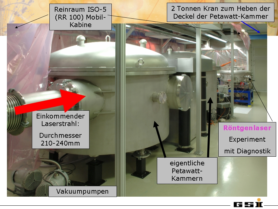 Ansicht der Petawatt Kompressionskammer bei PHELIX